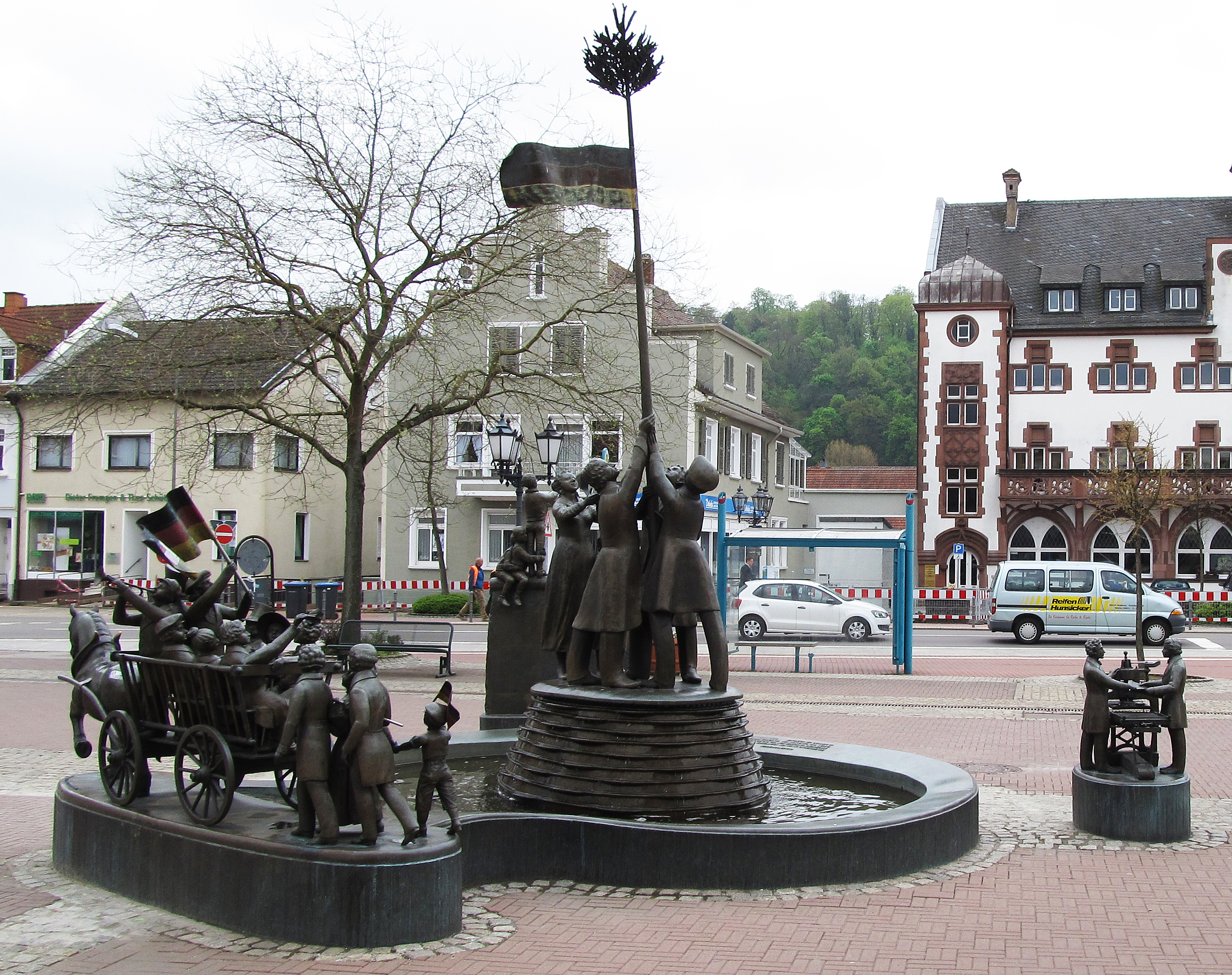 Der Freiheitsbrunnen in Homburg/Saar